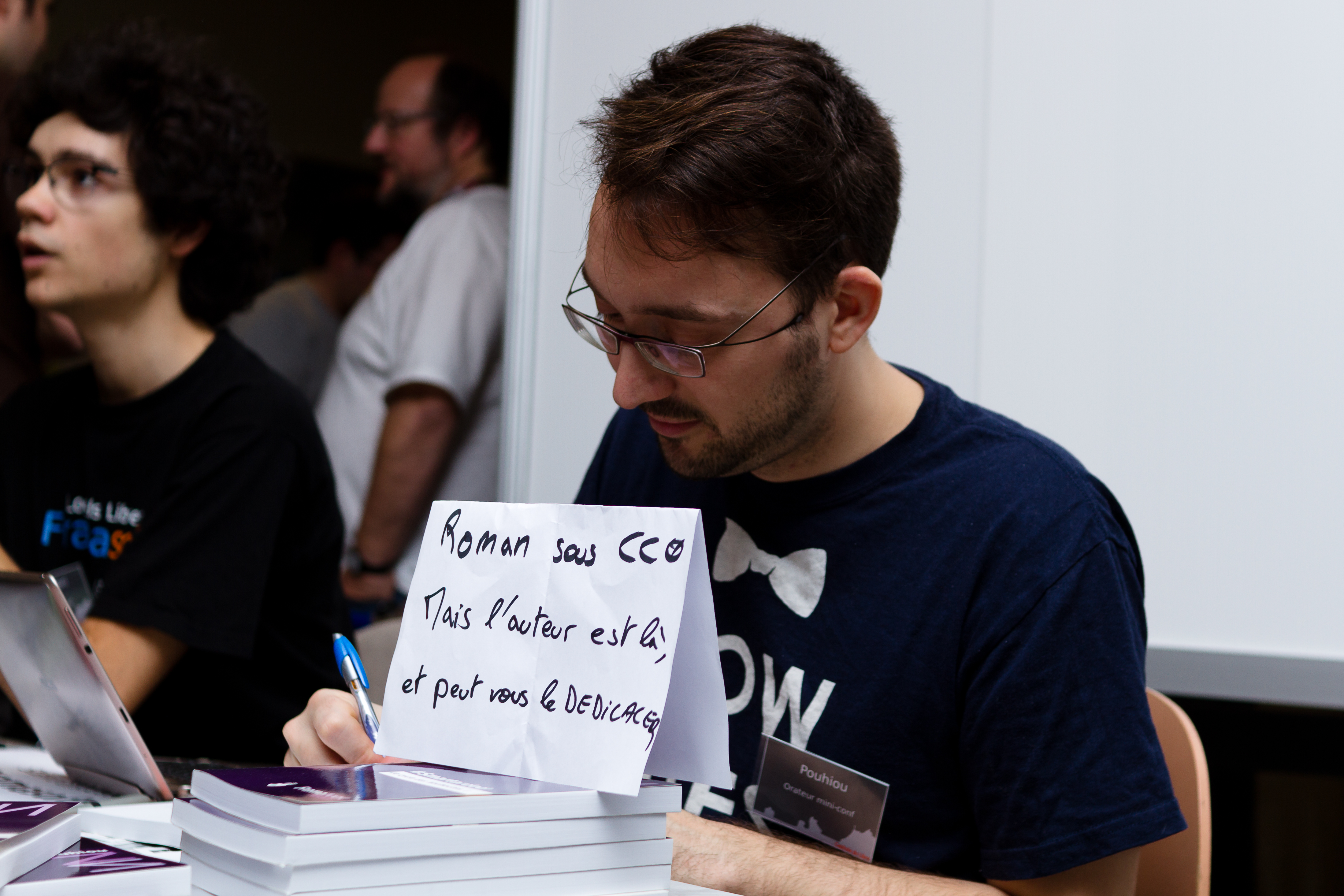 Capitole du libre, 24 novembre 2012